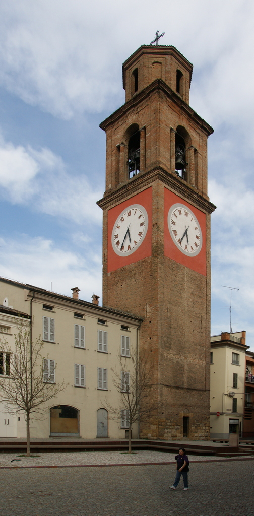 Il Campanile